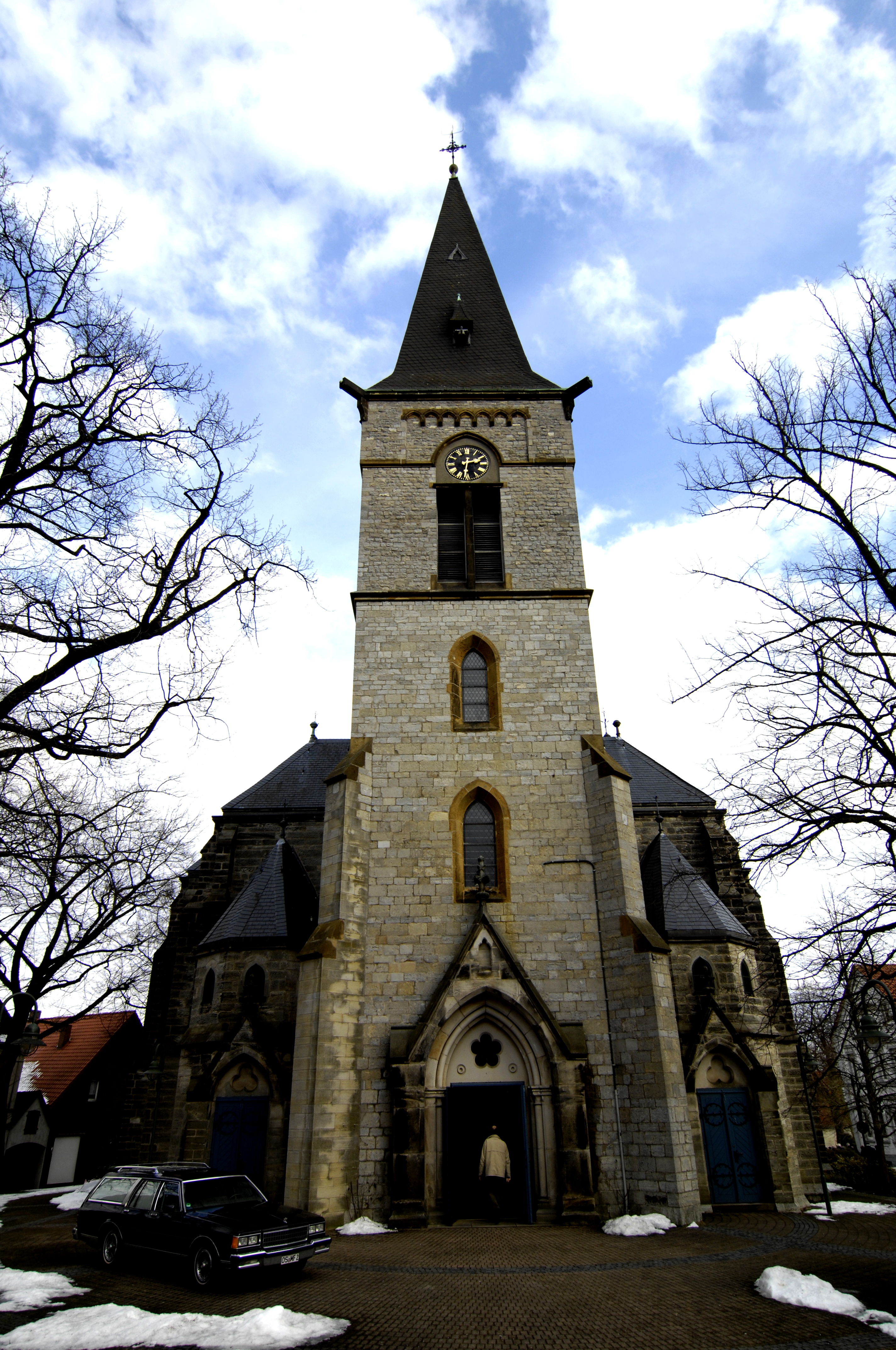 Kirche in Melle-Neuenkirchen